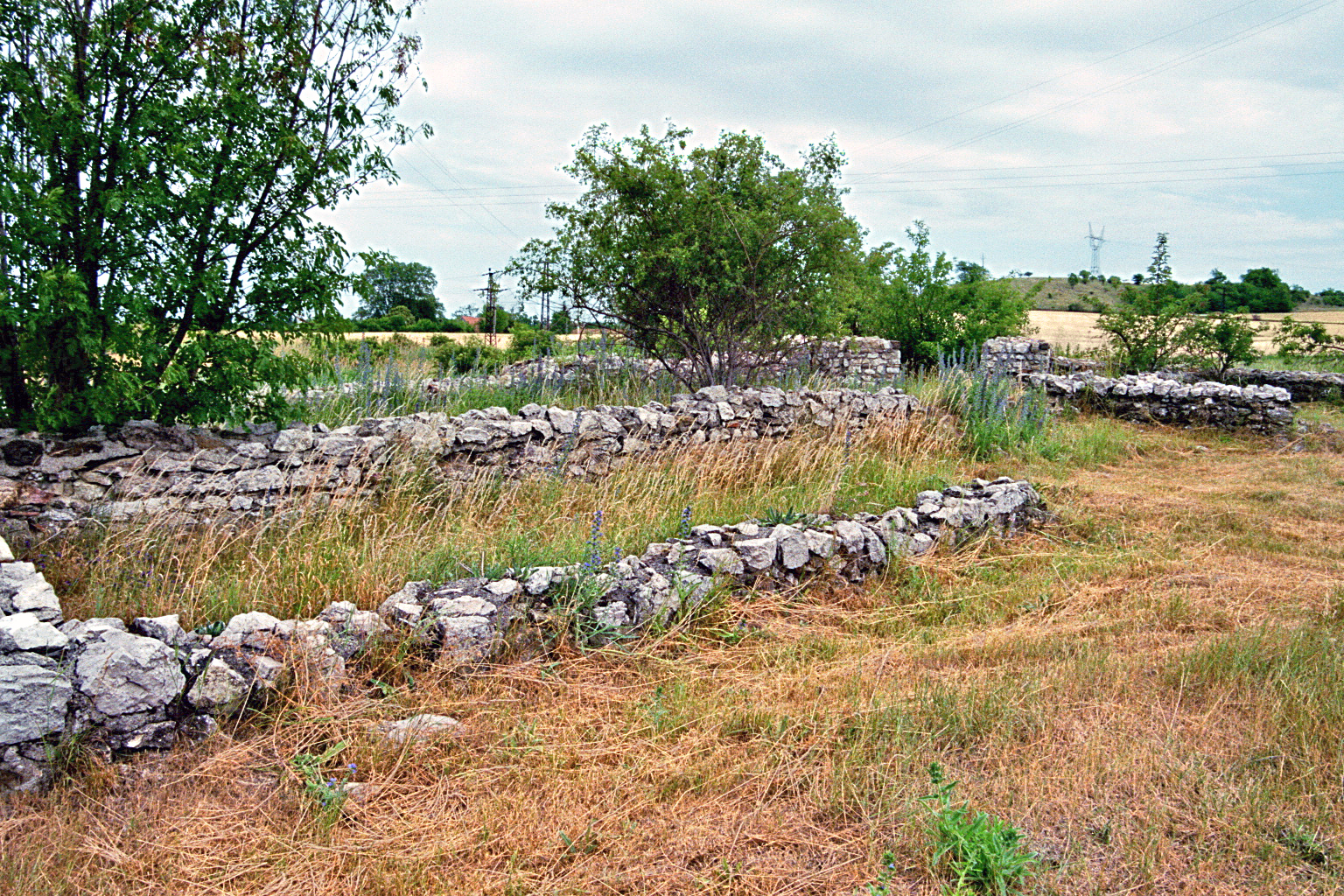 Kastell Tokod, Ungarn: Bebauung in der Ostecke. This is a photo of a monument in Hungary, Identifier: 6487